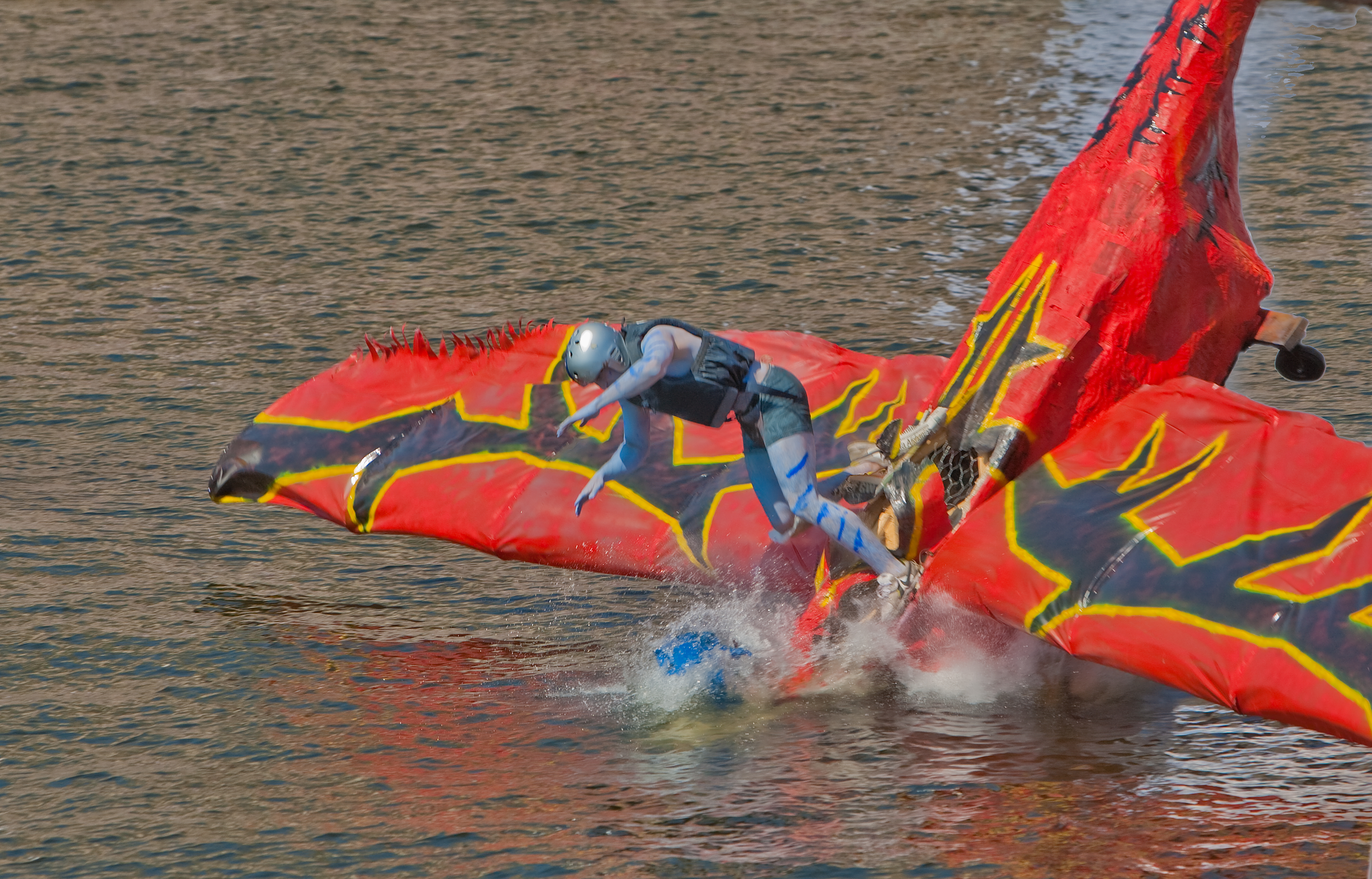 Red Bull Flugtag Stockholm Sweden July 2010